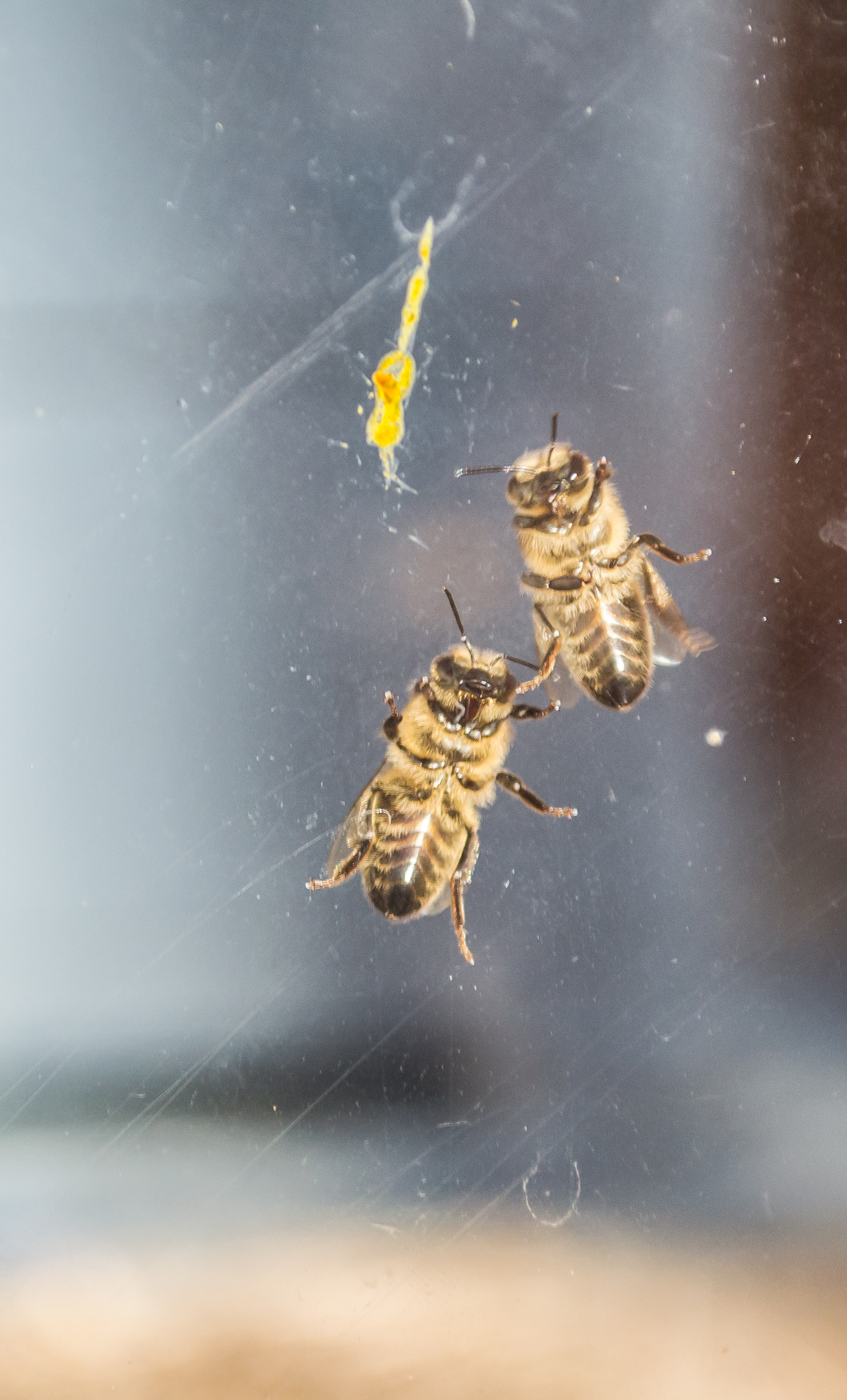 Abejas melíferas en el Primer Corte de la Miel, en Ayora, Valencia.